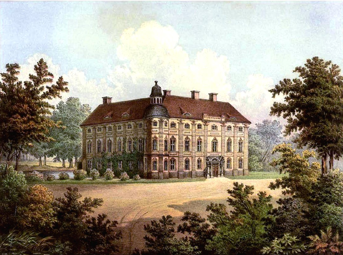 Schloss Brunzelwaldau, Kreis Freistadt, Provinz Schlesien